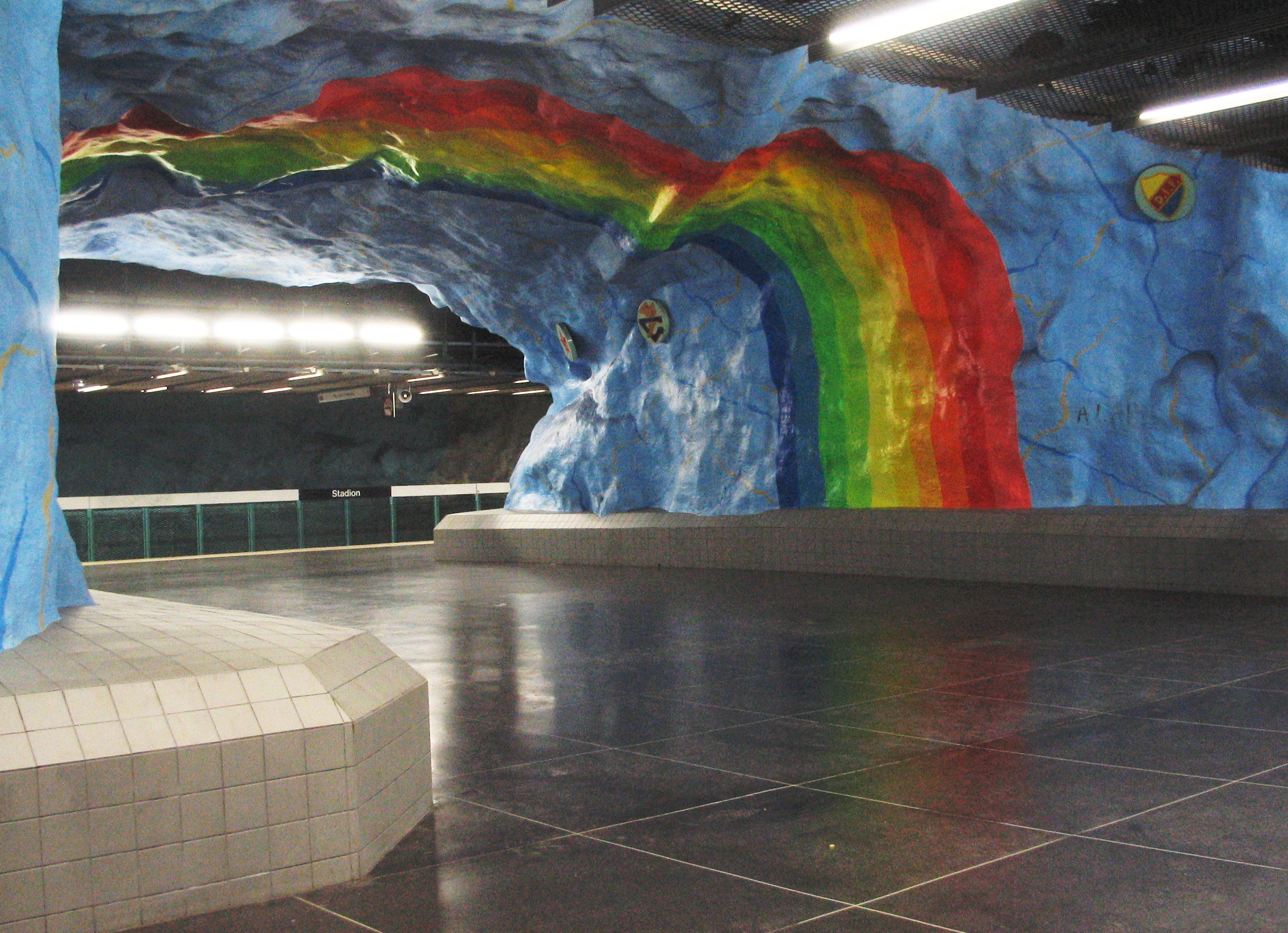 Stadion, a metro station in Stockholm, Sweden.